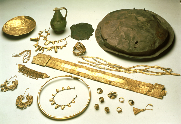 Tesoro de Aliseda (Conjunto) (Periodo Orientalizante). Número de inventario: Conjunto 586.Representación Grafico-visual,tesorillo:parece origen Tartesico,apreciamos delicadisimo estilo artesanal Egiptizante u Orientalizante,destacar ¿cinturón? de oro,representación a 2 lineas "Ritual" a descifrar,quizas definiría entendimiento global.